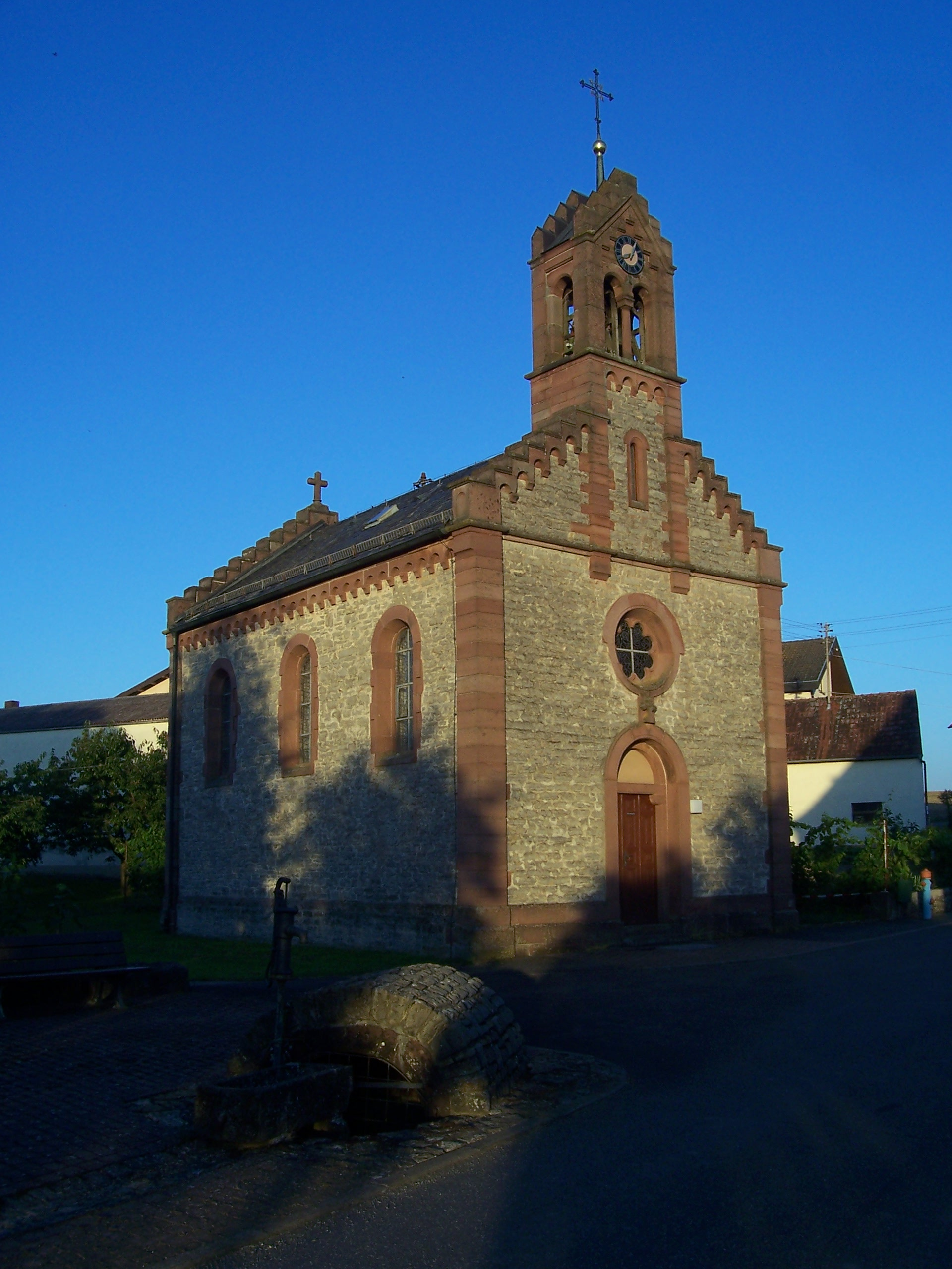 Kapelle zur Schmerzhaften Mutter Gottes in Hof Steinbach (Tauberbischofsheim), eingeweiht am 8. Juli 1876